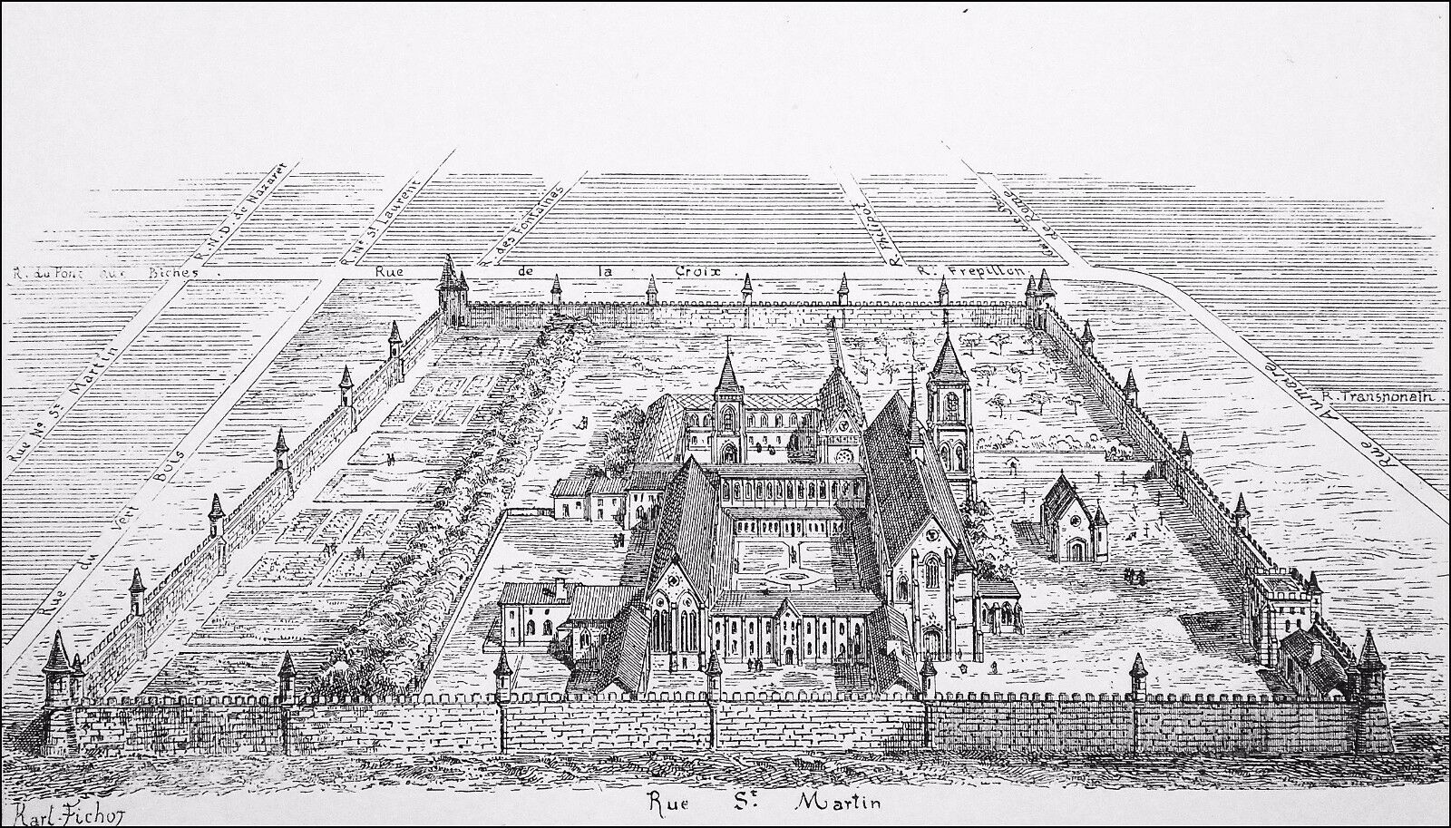 Prieuré Saint-Martin-des-Champs, gravure du XIXe siècle.